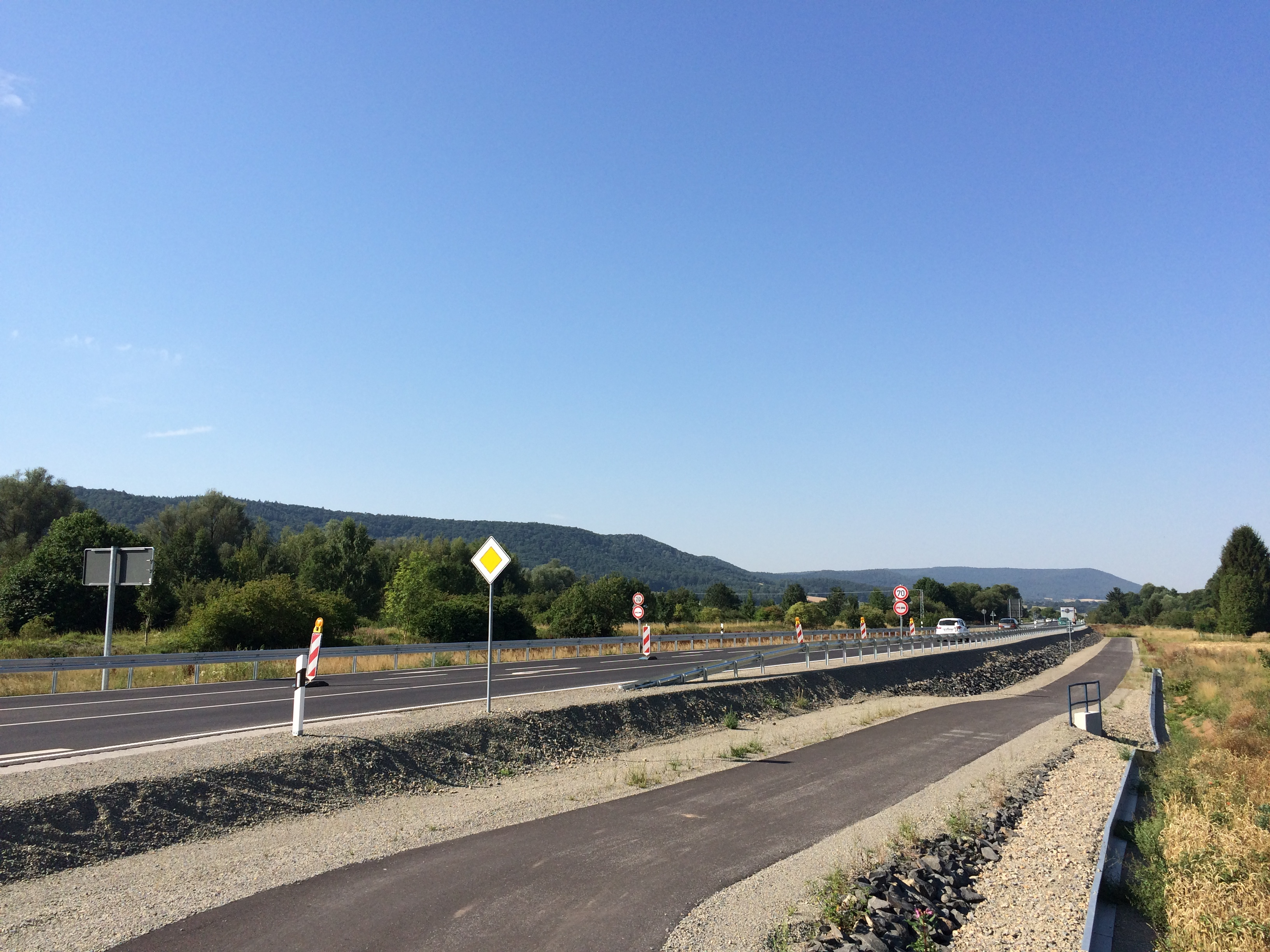 Der Hessische Radfernweg R5 zwischen Frieda und Wanfried an der Bundesstraße 249 (Ortsumgehung Frieda auf der Trasse der ehemaligen Bahnstrecke Schwebda-Wartha, links der nördliche Schlierbachswald)